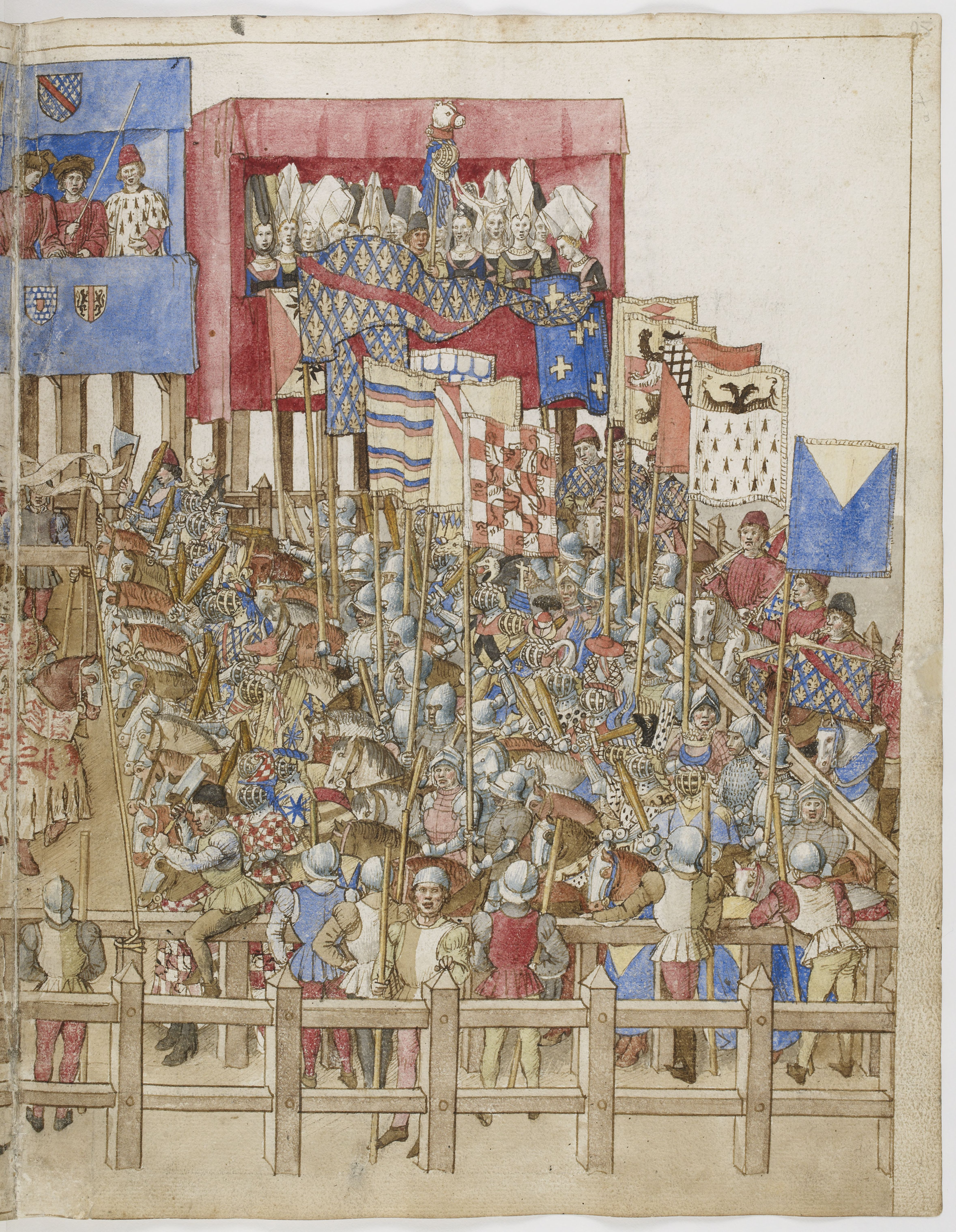 Enluminure du Livre des tournois du Roi René d'Anjou, dessins de Barthélemy d'Eyck